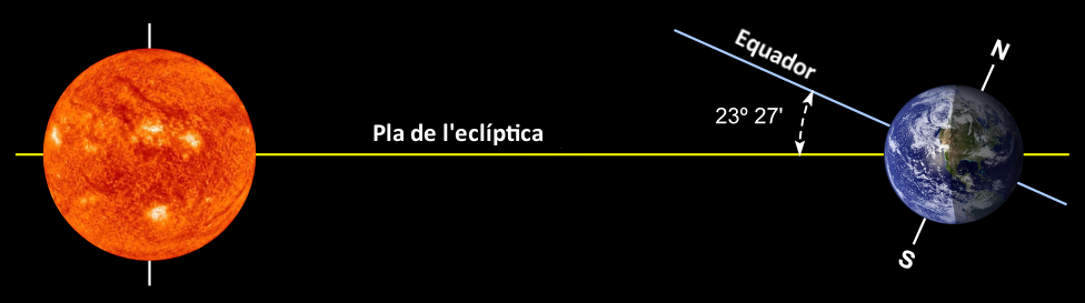 Pla de l'eclíptica esquemàtic